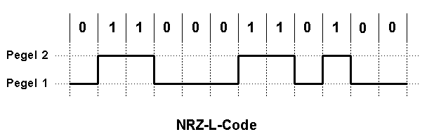 NRZ-L-Kodierung Andere Versionen: NRZ-I-Kodierung, NRZ-S-Kodierung, RZ-Kodierung